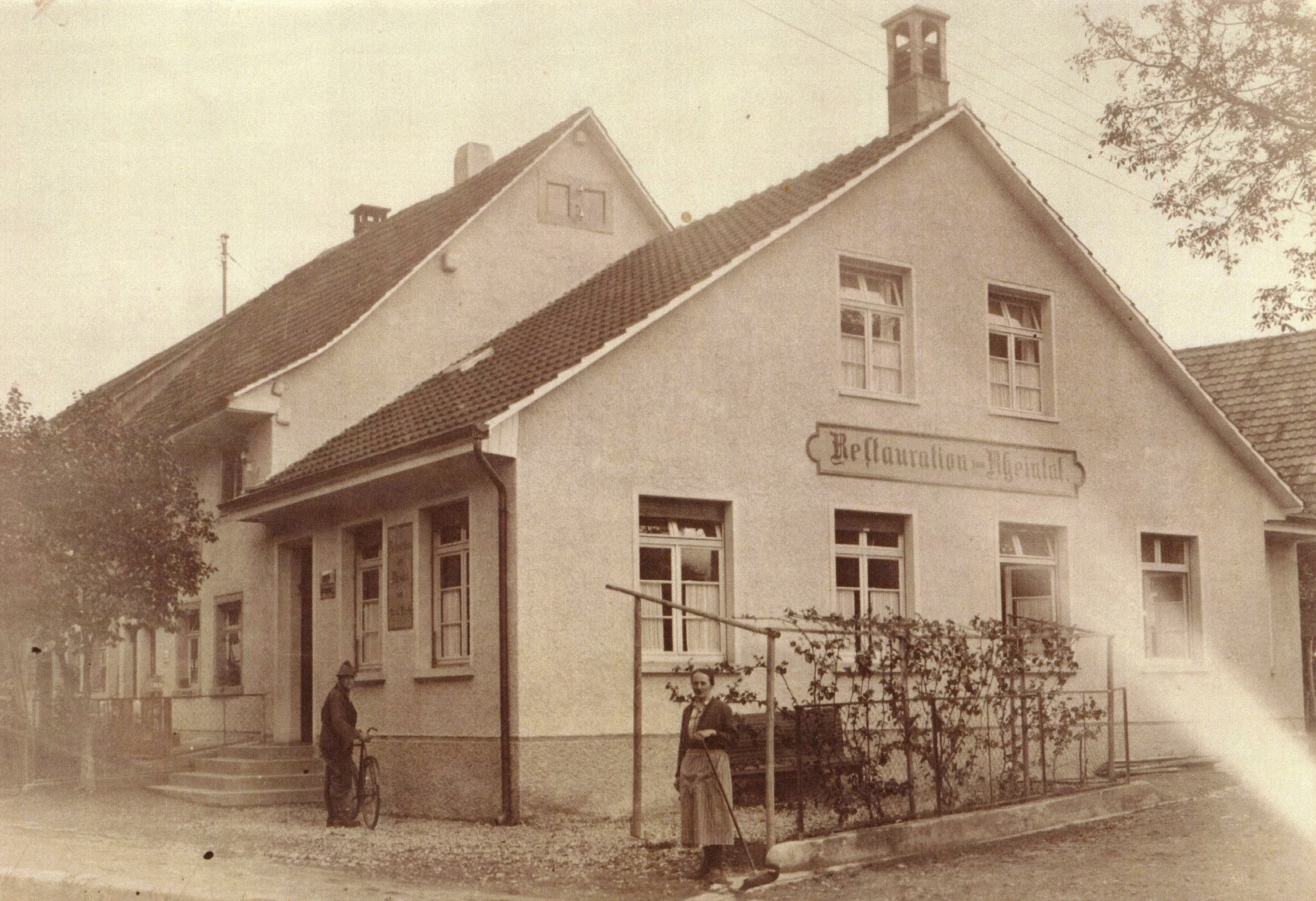 Gasthaus zum Rheintal in Reckingen (Küssaberg) im Landkreis Waldshut in Baden-Württemberg. Aufnahme 1925.